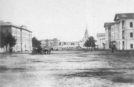 Главный просп. (Проспект Ленина), Екатеринбург, Россия, 1910